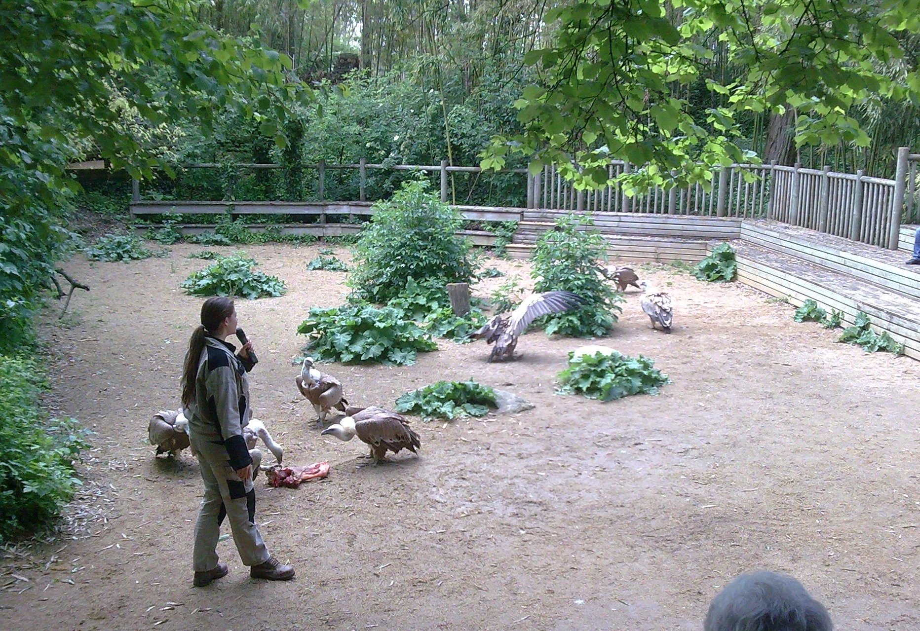 animation pédagogique de la curée des vautours au Bioparc zoo de Doué-la-Fontaine.